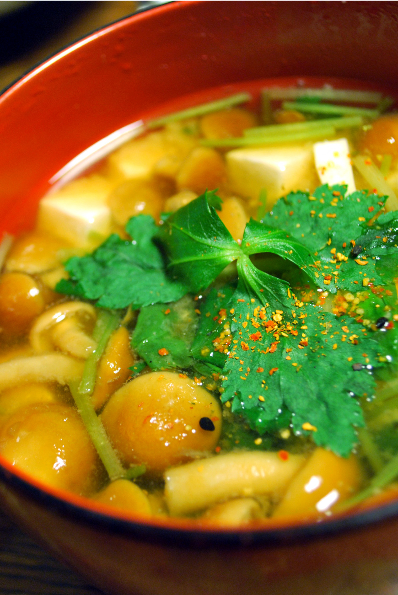 なめこと豆腐の味噌汁